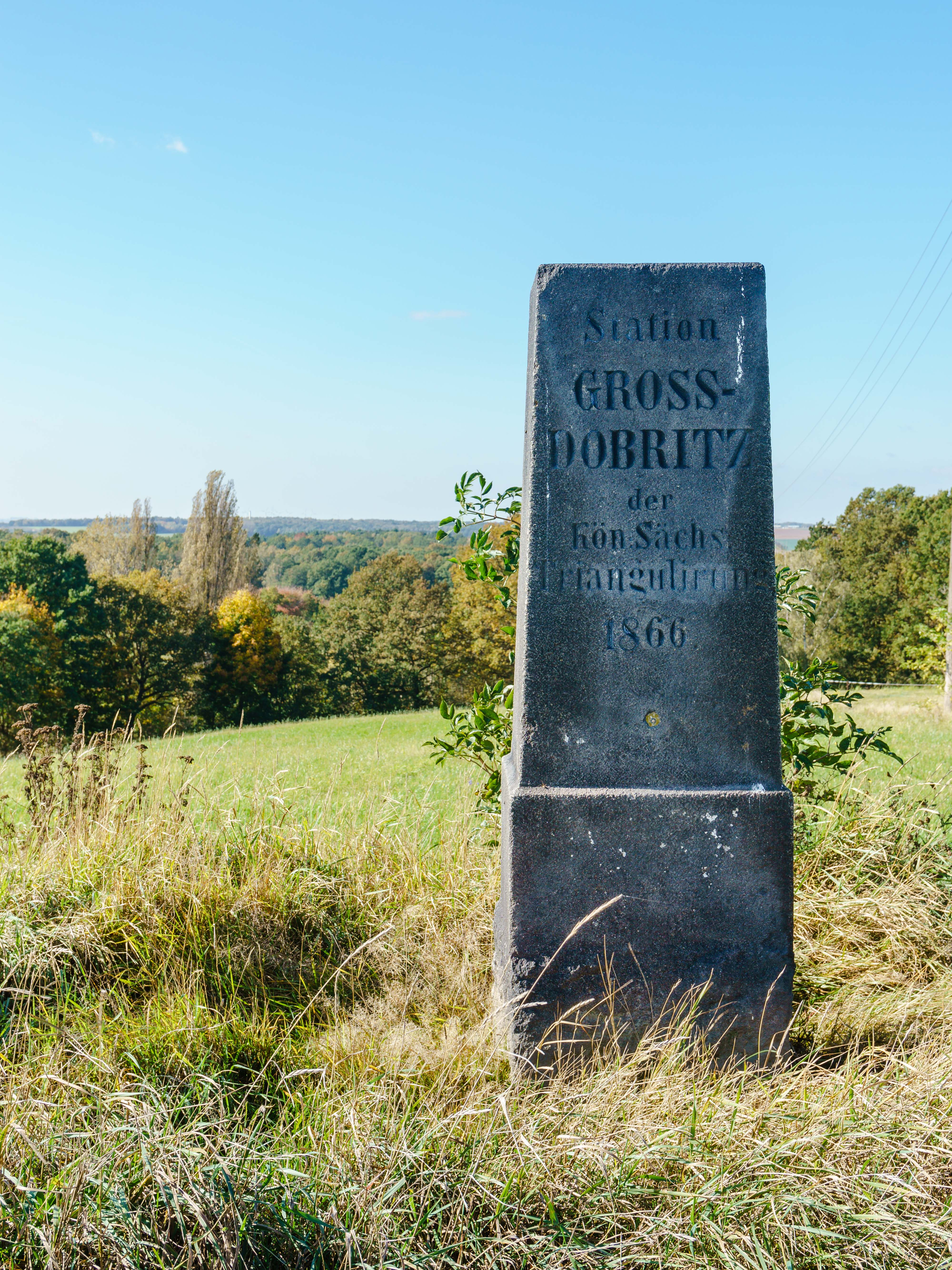 Königlich Sächsische Triangulationssäule Station 30 Grossdobritz, Vermessungspunkt I. Ordnung in Niederau OT Großdobritz Text: Station GROSSDOBRITZ der Kön.Sächs. Triangulirung 1866